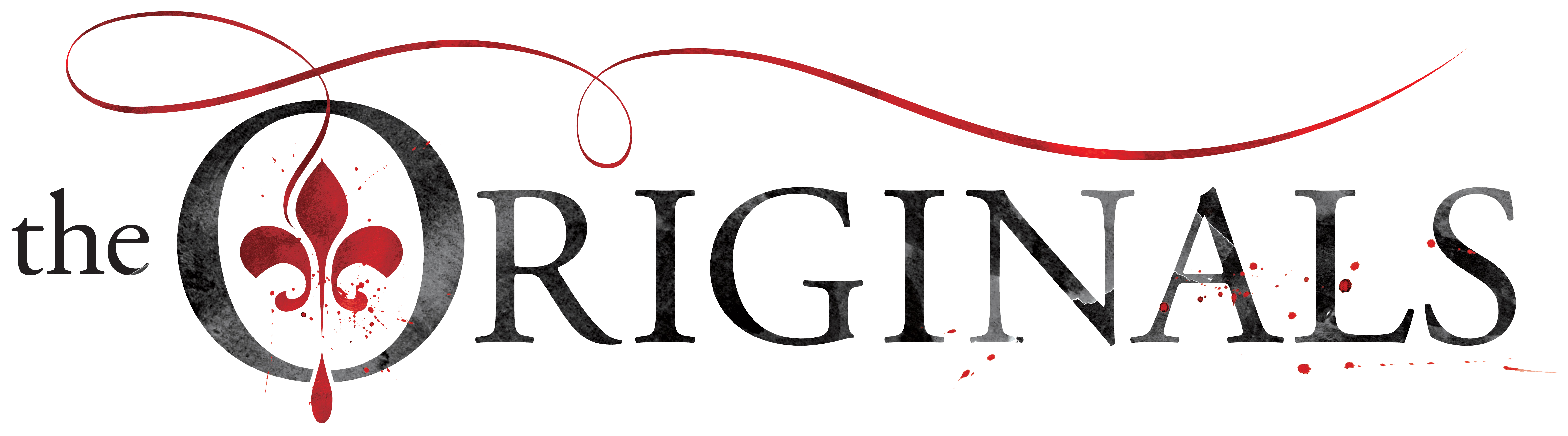 Logo de la série télévisée américaine The Originals.